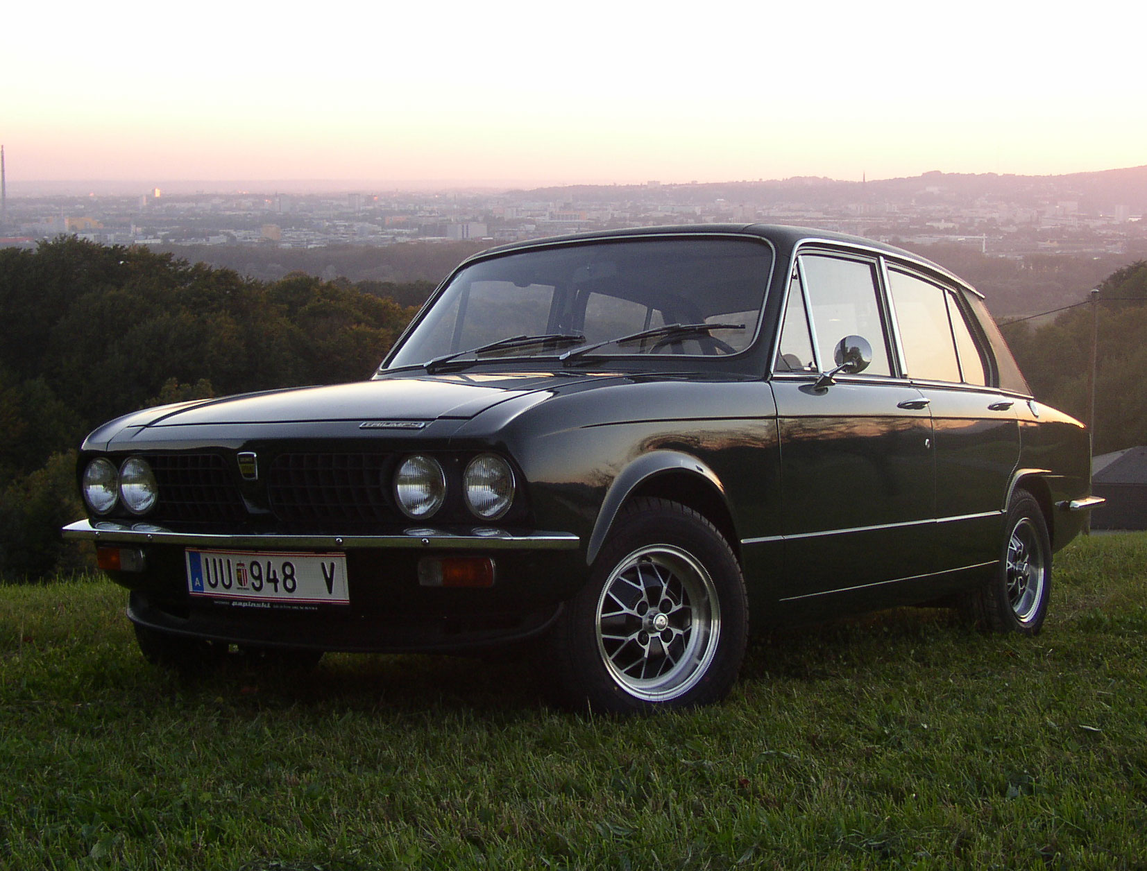 Fotografiert von Benjamin Kaineder 10/2005